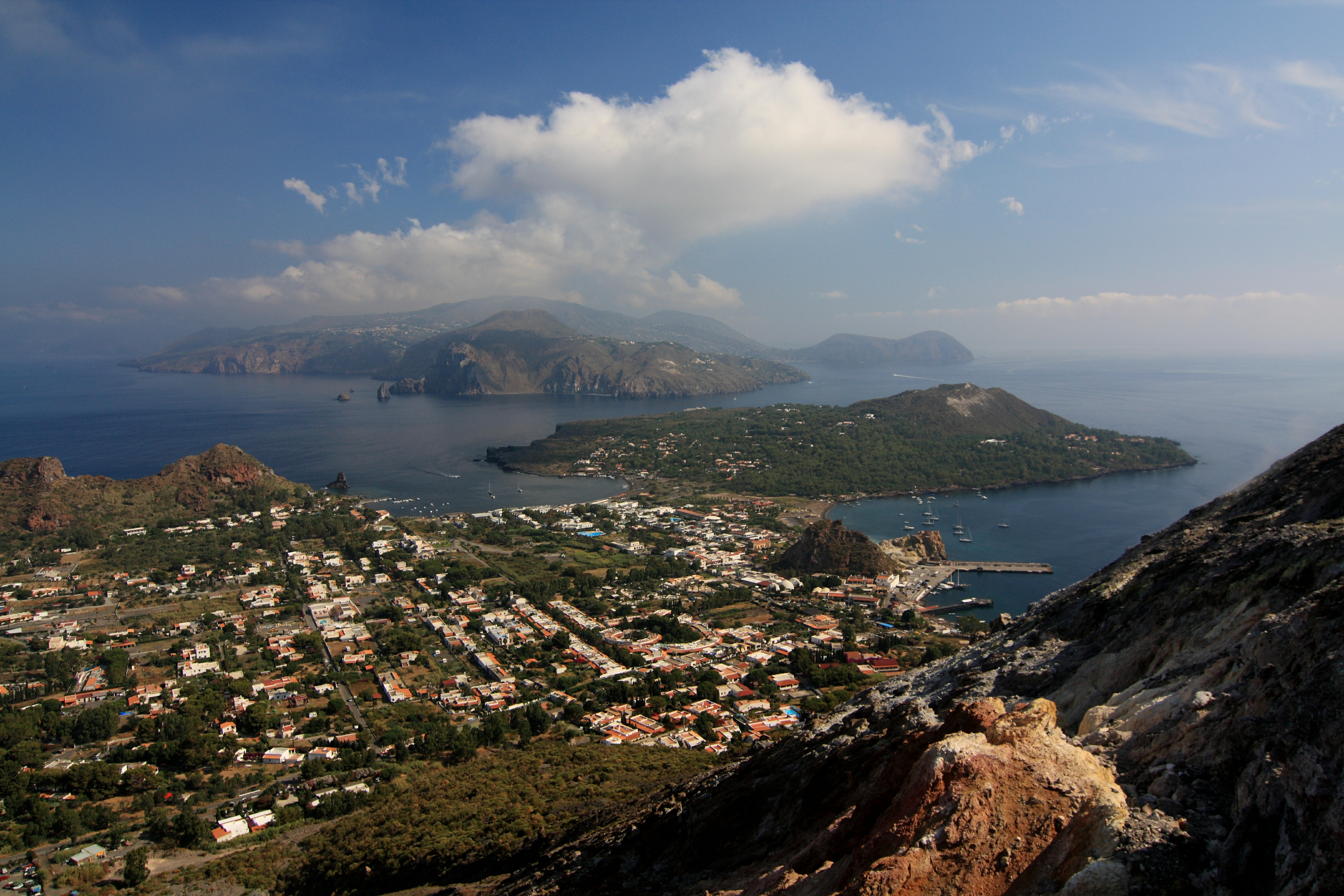 Vista su Lipari da Vulcano